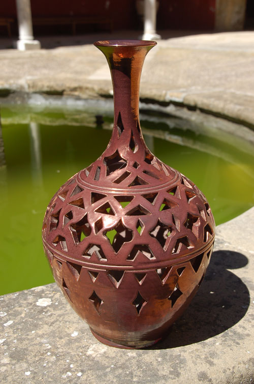 35 x 50 cm realizado en el taller de cerámica de la Escuela de Arte Casa de las Torres